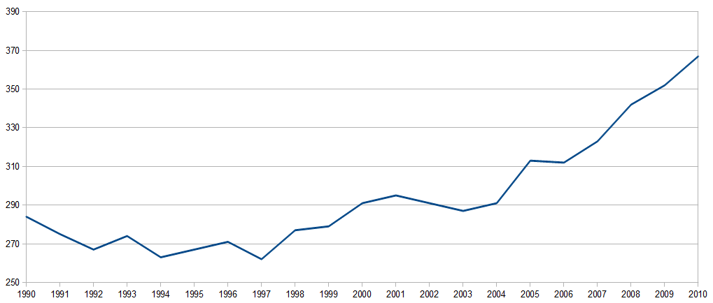 DSG Schüleranzahl